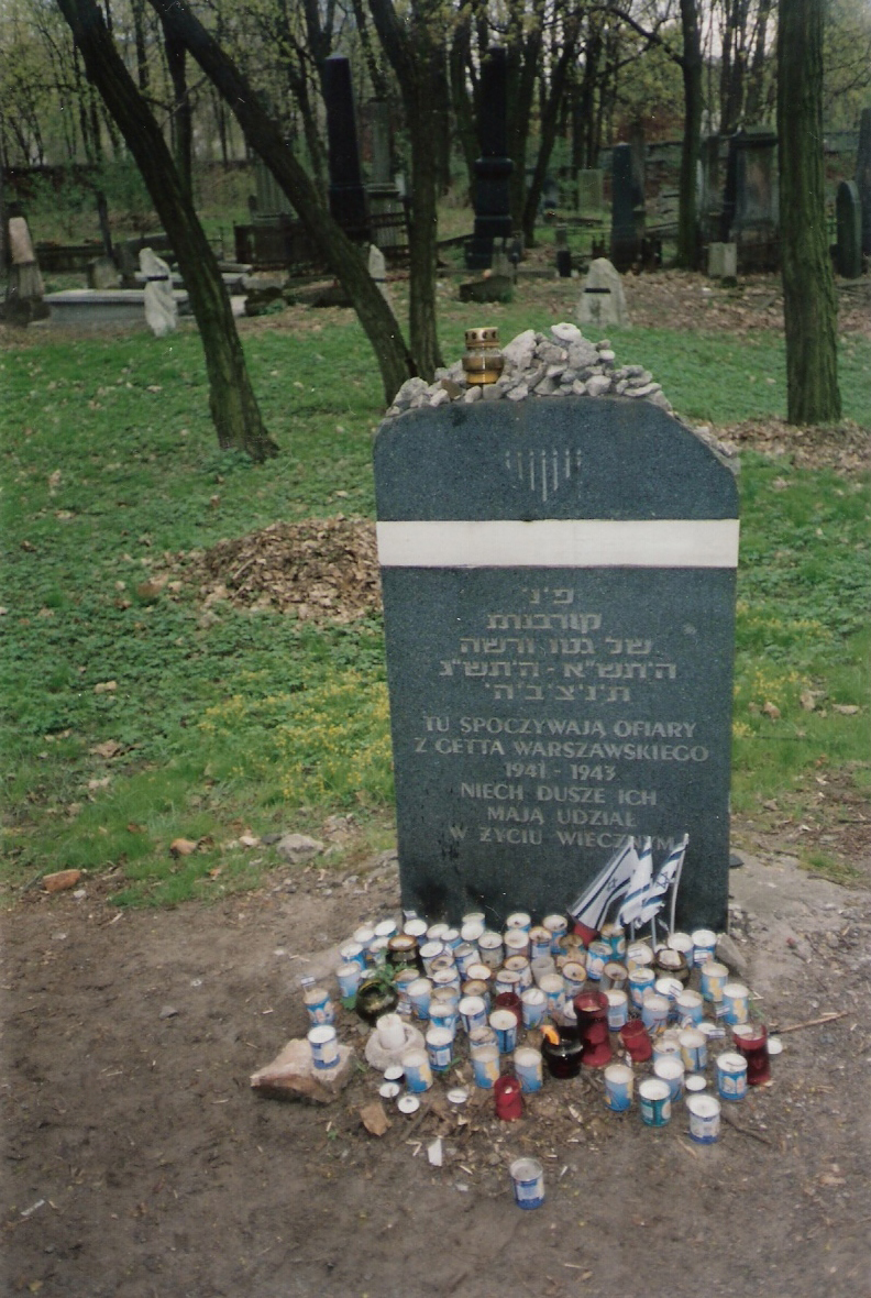 הבור הגדול בבית הקברות היהודי בורשה mass grave in the jewish cemetery in warsaw ghetto